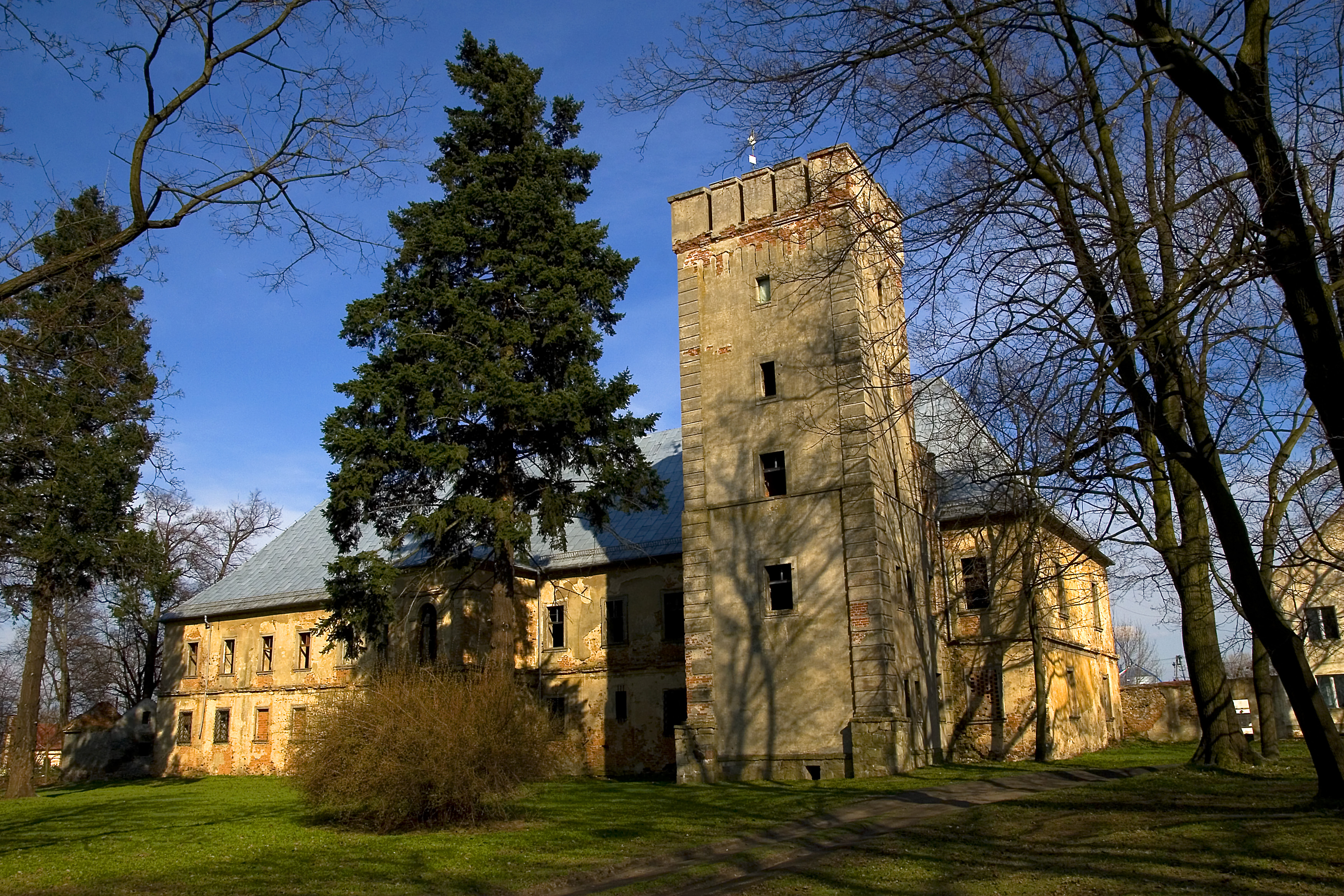 Pałac w Przydrożu Małym.Gmina Korfantów, powiat nyski 11.1959.